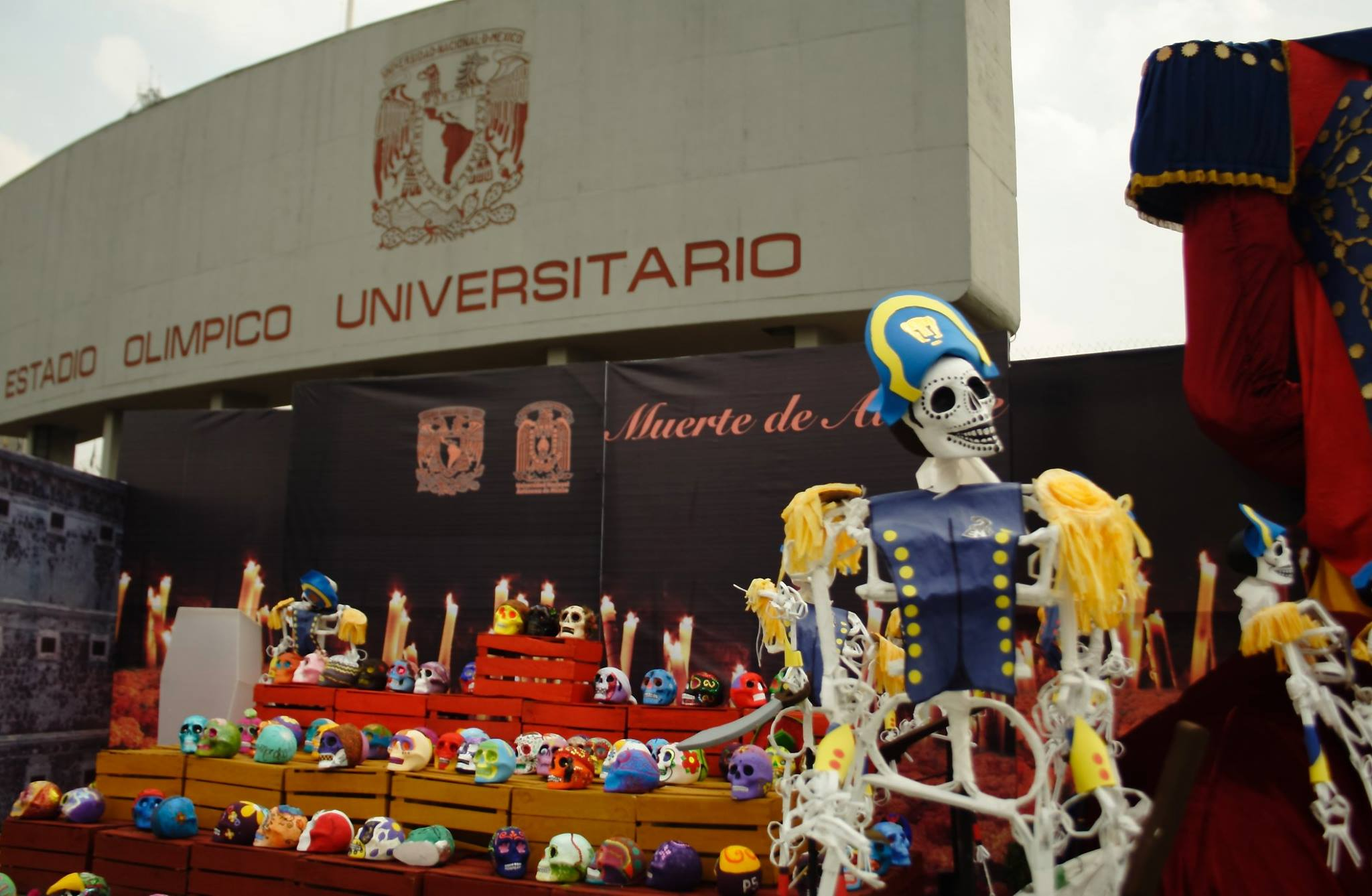 Vista desde una ofrenda hacia el estadio olímpico.